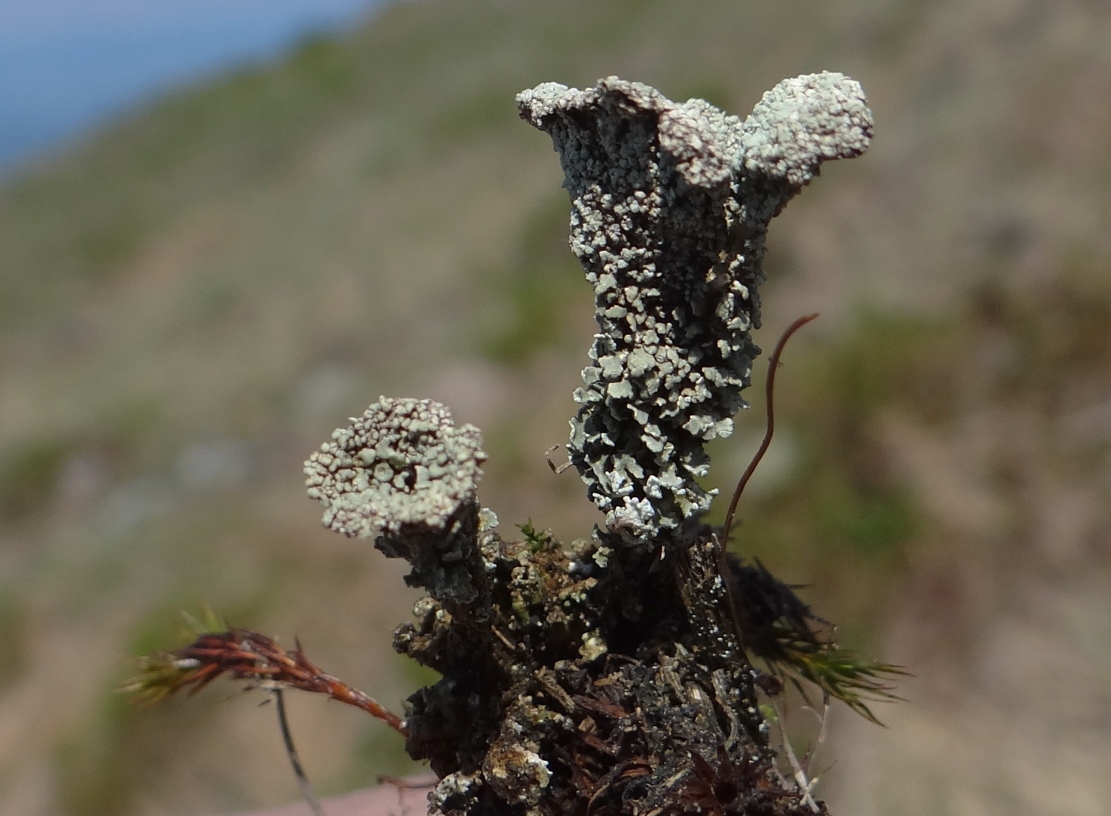 Cladonia pocillum (location: Tatra Mountains, Małołączniak)